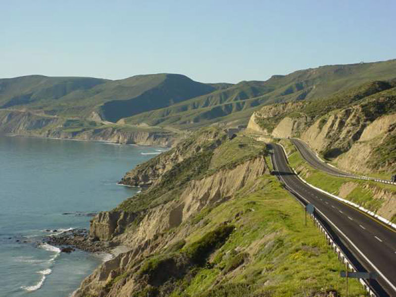 Autopista que conecta Tijuana con Ensenada, conocida también como "La Escénica"